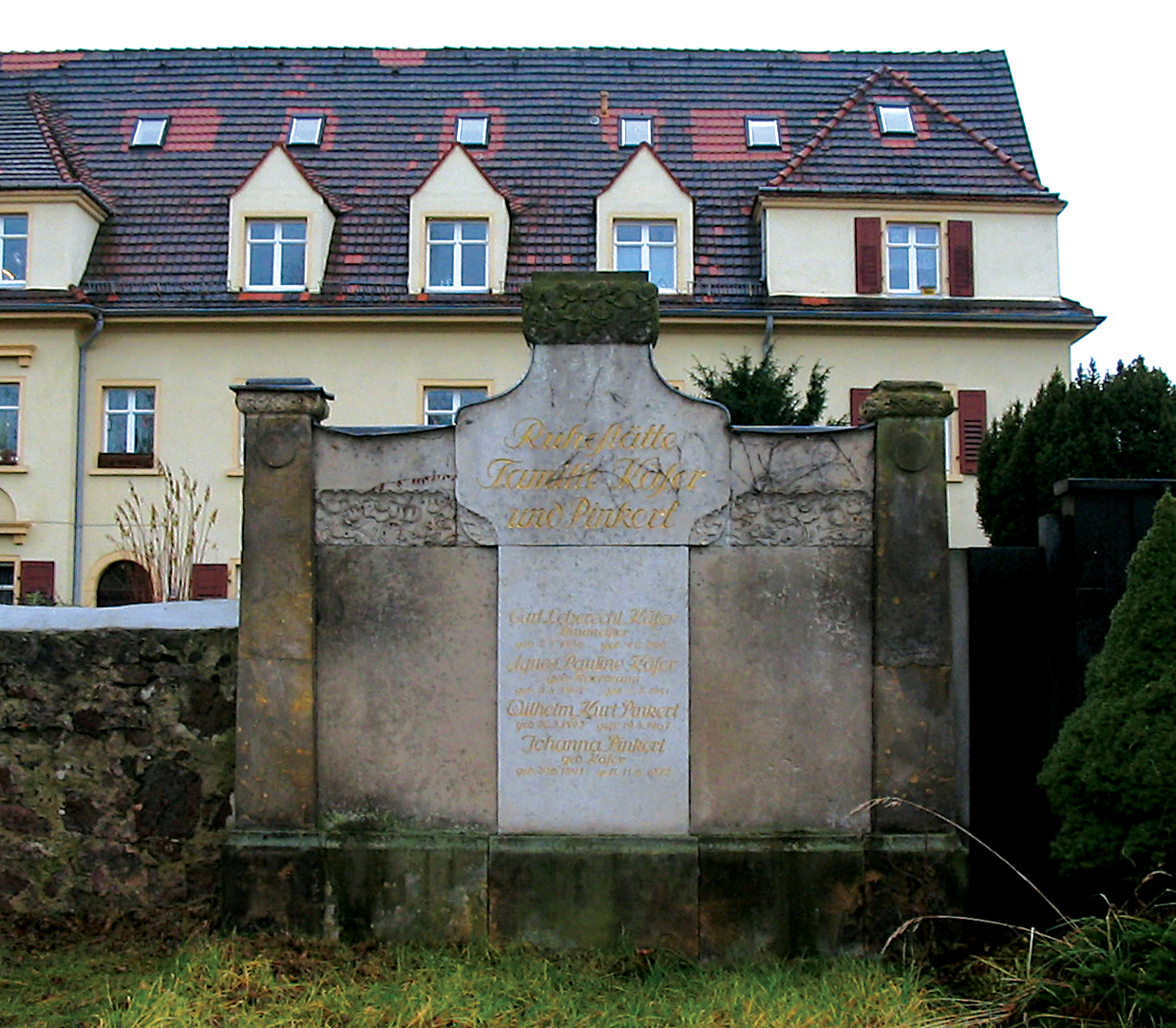 Friedhof Radebeul-Ost, Grabmal von Carl Käfer